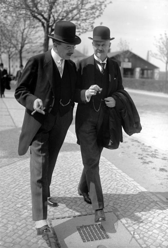 Der Reichssparkommissar a.D. Saemisch wird Reichsbank-Kommissar! Der neue Reichsbank-Kommissar Minister a.D. Saemisch.